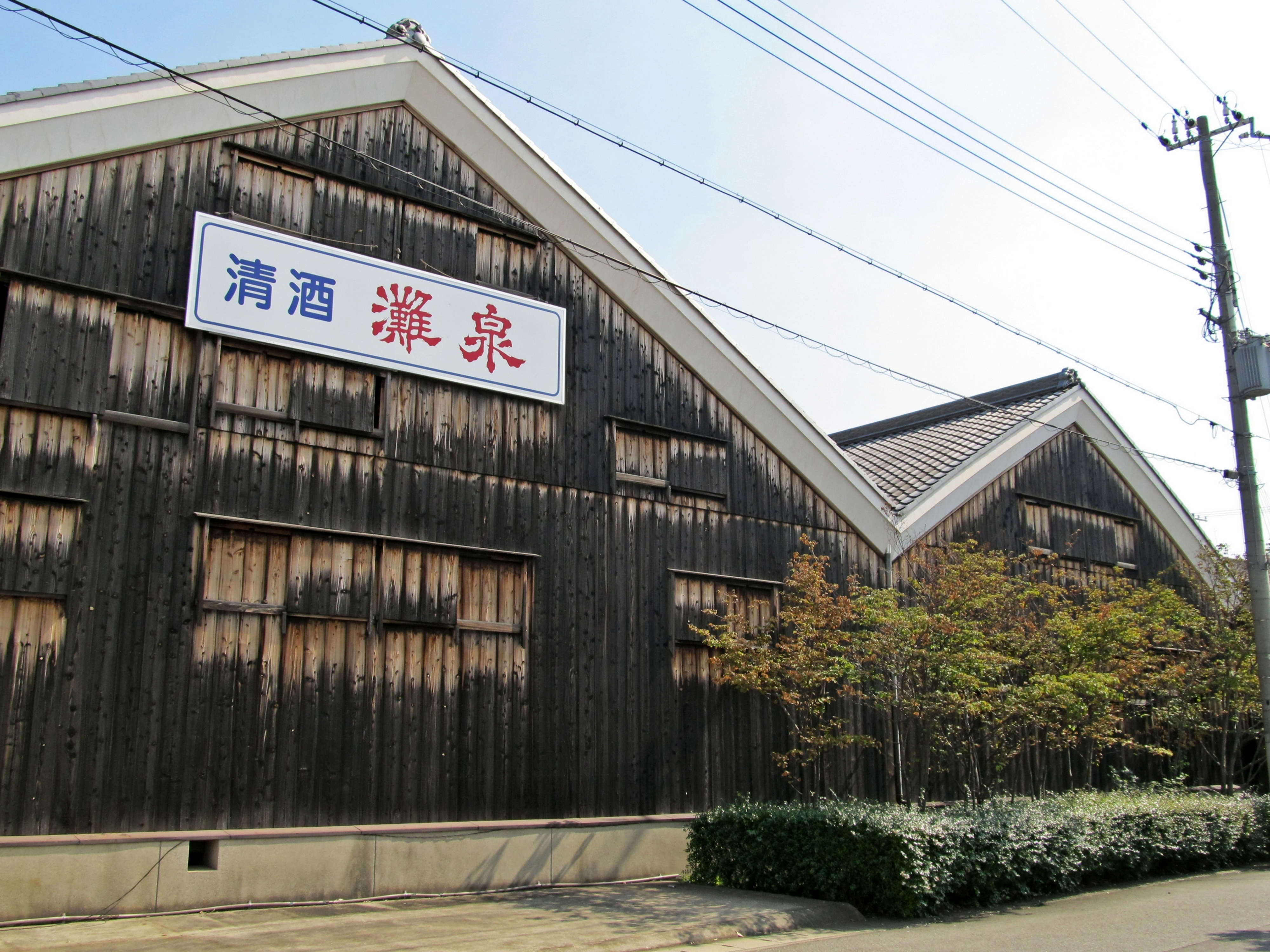 泉勇之介商店の酒蔵。灘五郷唯一の木造酒蔵。国の登録有形文化財。所在地は兵庫県神戸市東灘区御影塚町1丁目。